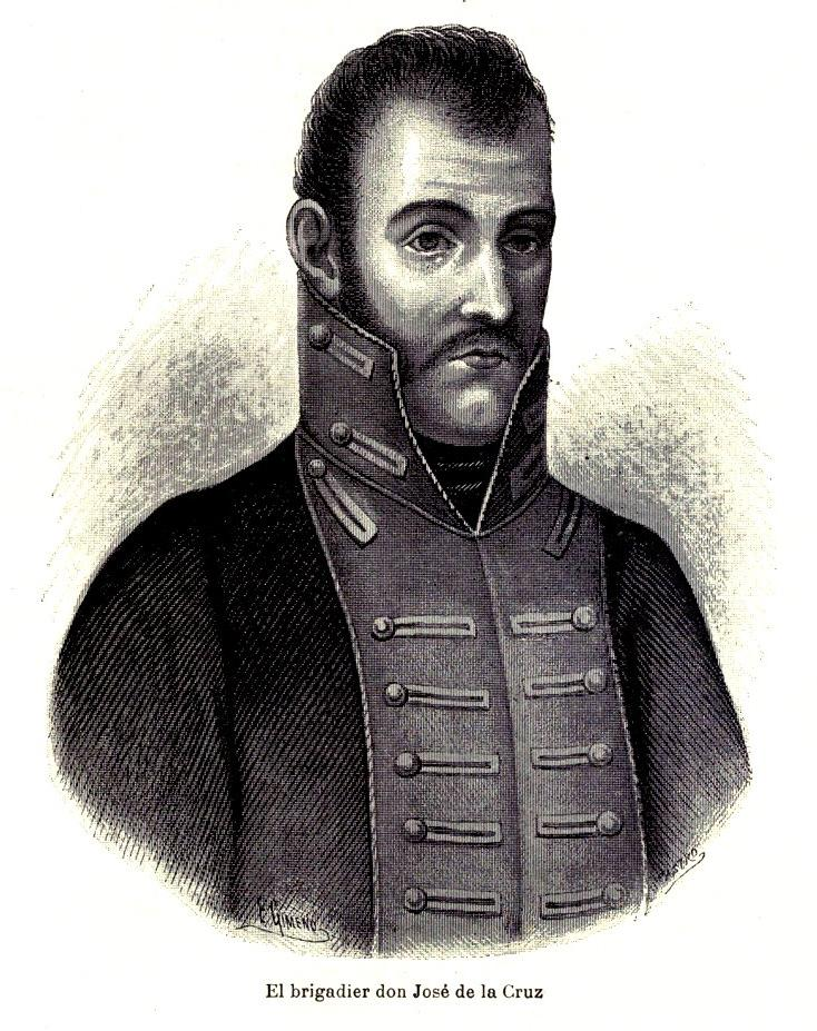 Imagen extraida del libro de Vicente Riva Palacio, Julio Zárate (1880) "México a través de los siglos" Tomo III: "La guerra de independencia" (1808 - 1821)